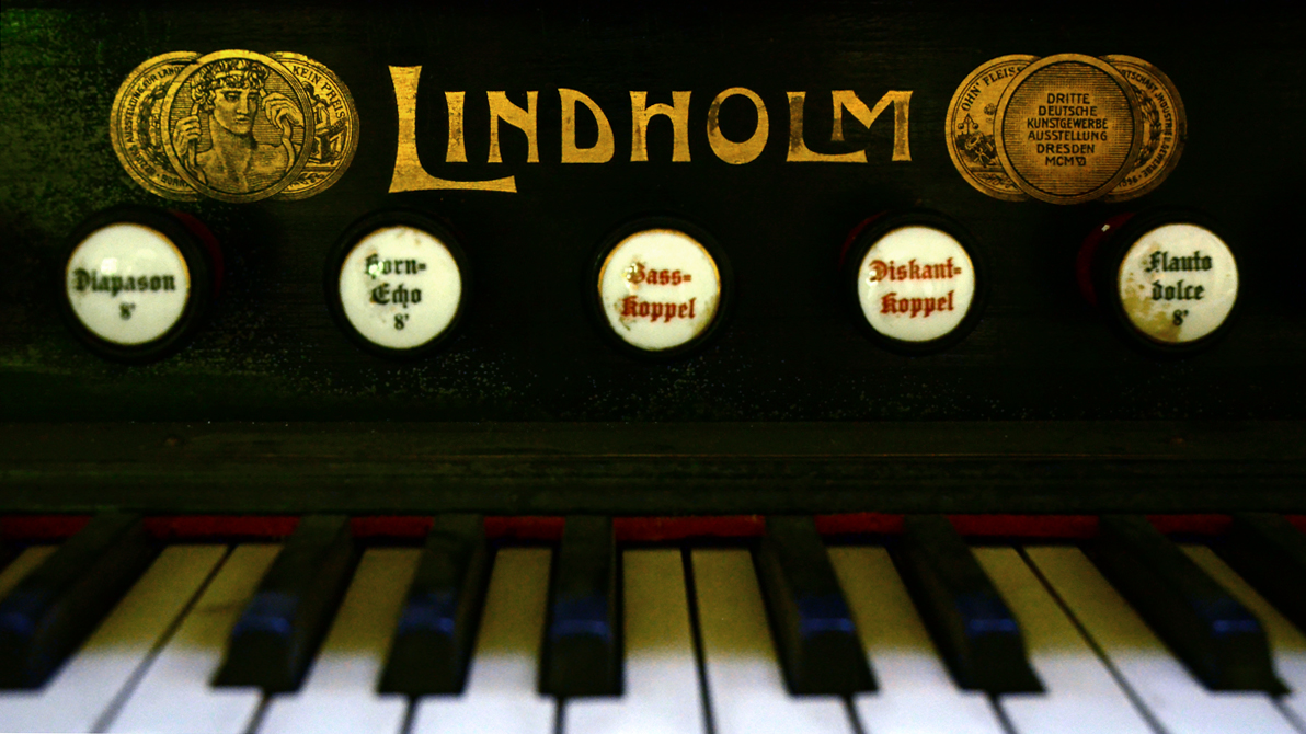 Leider aufgrund der Eile und der Lichtverhältnisse etwas unscharf zu lesender Schriftzug des Harmoniumbauers Lindholm mit Darstellung von zwei Medaillen mit Vor- und Rückseite, die eine der „Bezirks-Ausstellung für Landwirtschaft, Industrie und Gewerbe Borna 1896“ sowie „Deutsche Kunstgewerbeausstellung Dresden MCMVI“ ...